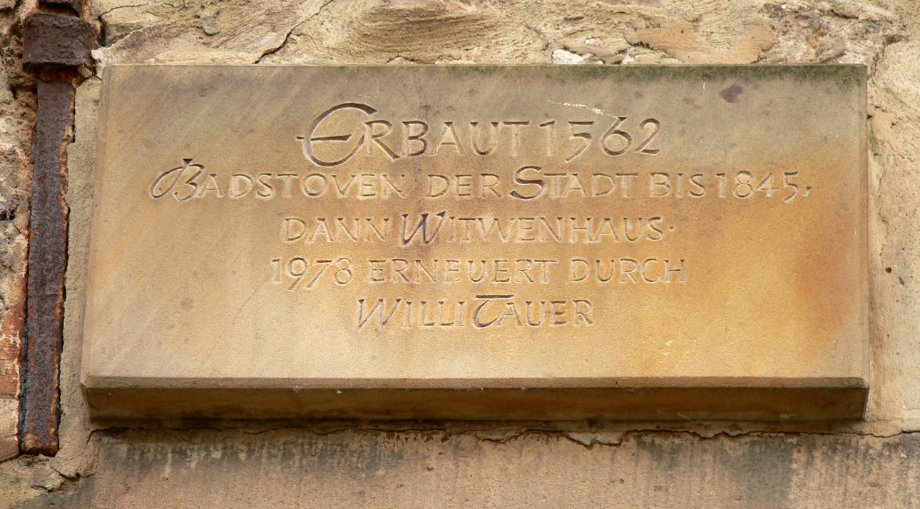 Gedenkstein zur Renovierung von 1978 am historischen Badstoven in Hann Münden